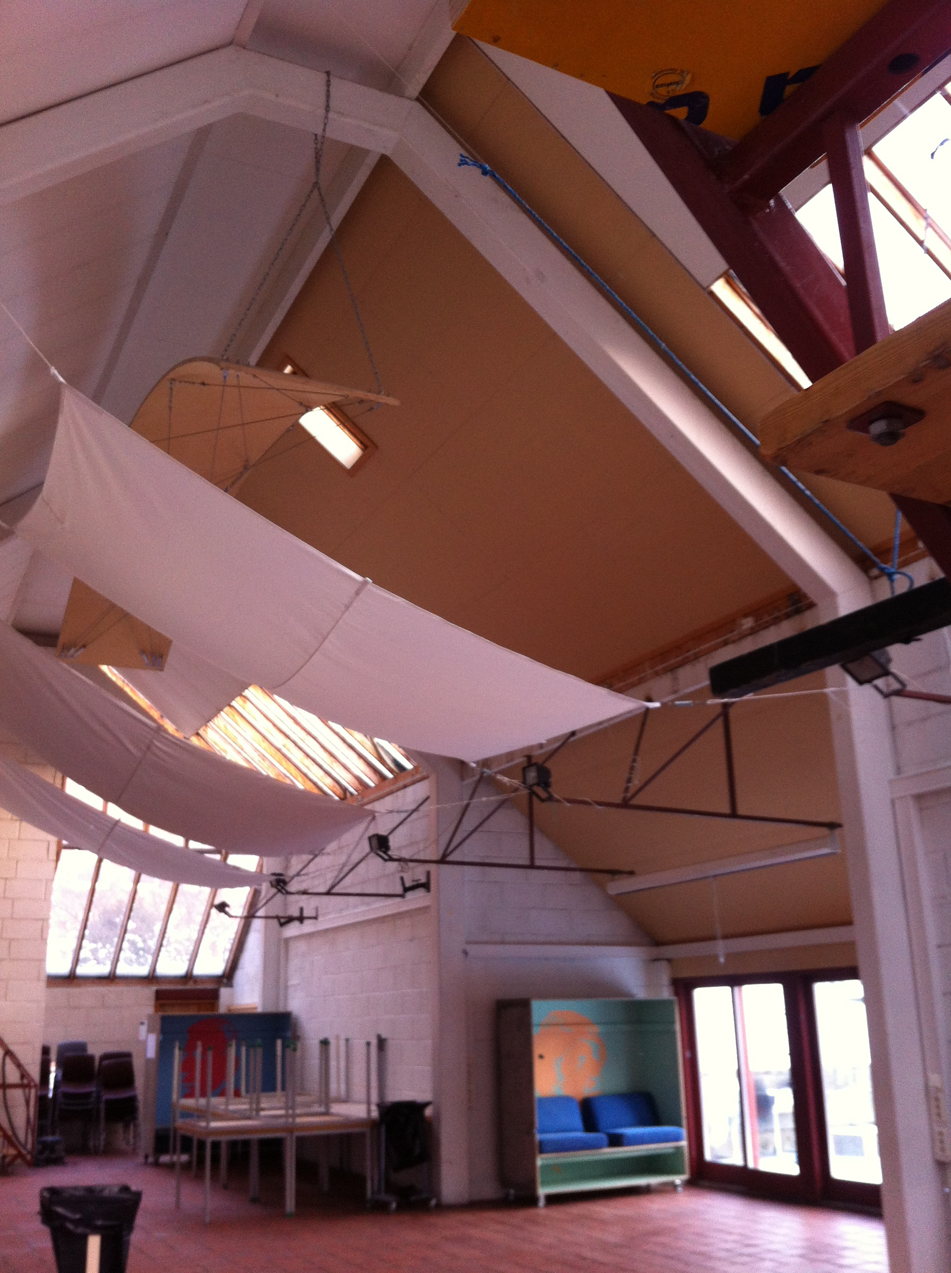 Forsøkshuset Skiboli på campus NTNU Gløshaugen, fotografert i 2013. De bygningstekniske løsningene var flere steder for dårlige. Her er glass skiftet ut med plater, pga lekkasje og korrosjon.